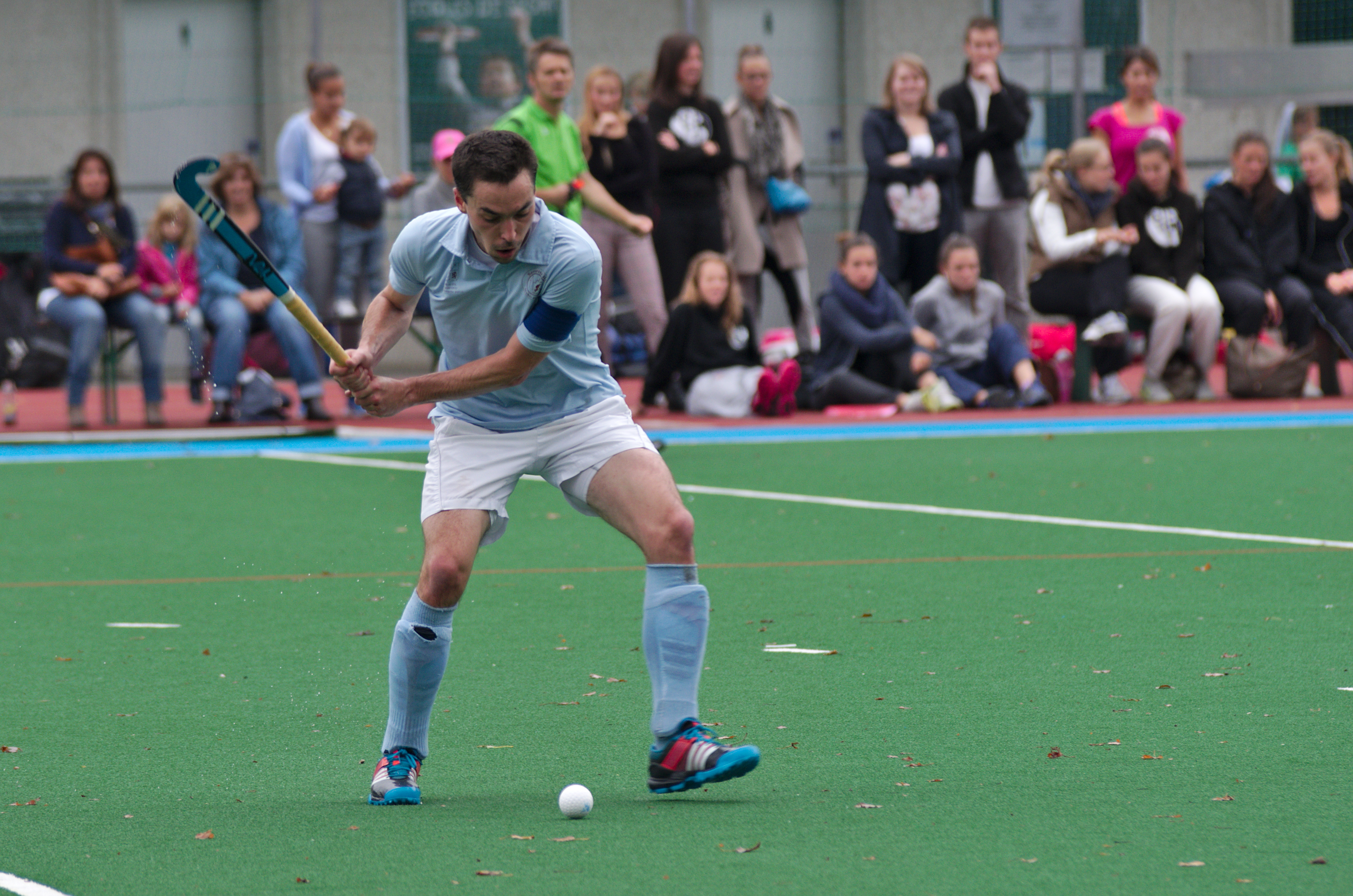 Hockey sur gazon - Servette HC vs Black Bloys HC - LNA hommes - 20141012 - Joueur N15 du Servette HC